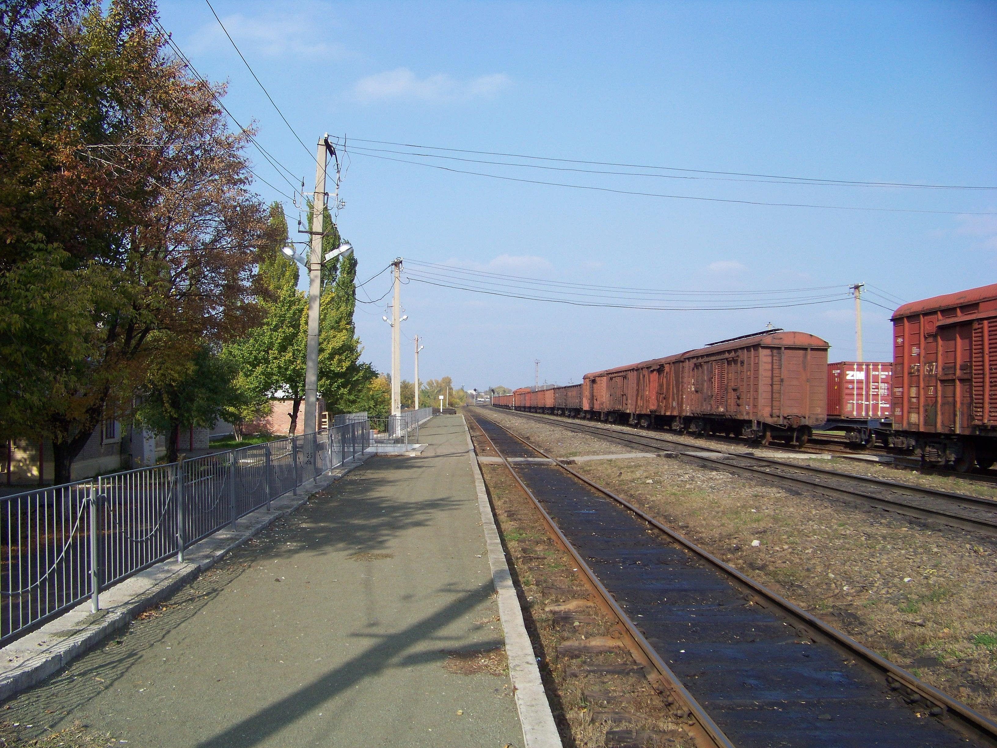 Перон станції Донецьк - 2 Донецької залізниці.